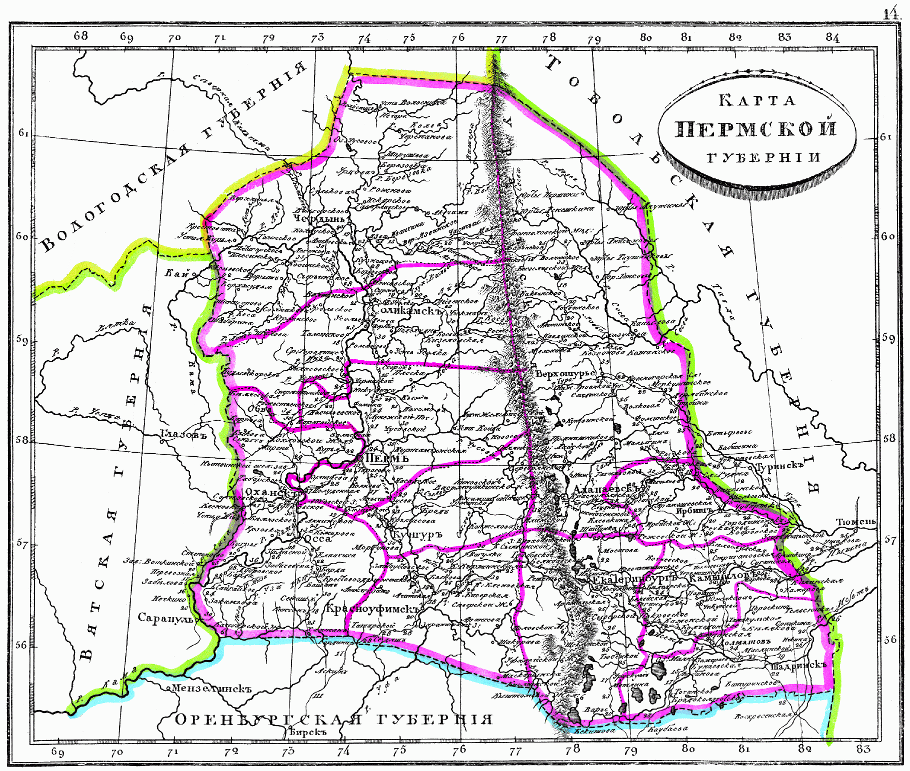 Карта Пермской губернии, 1835